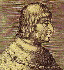 Fernando I de Nápoles, rey de Nápoles (1458-1494).